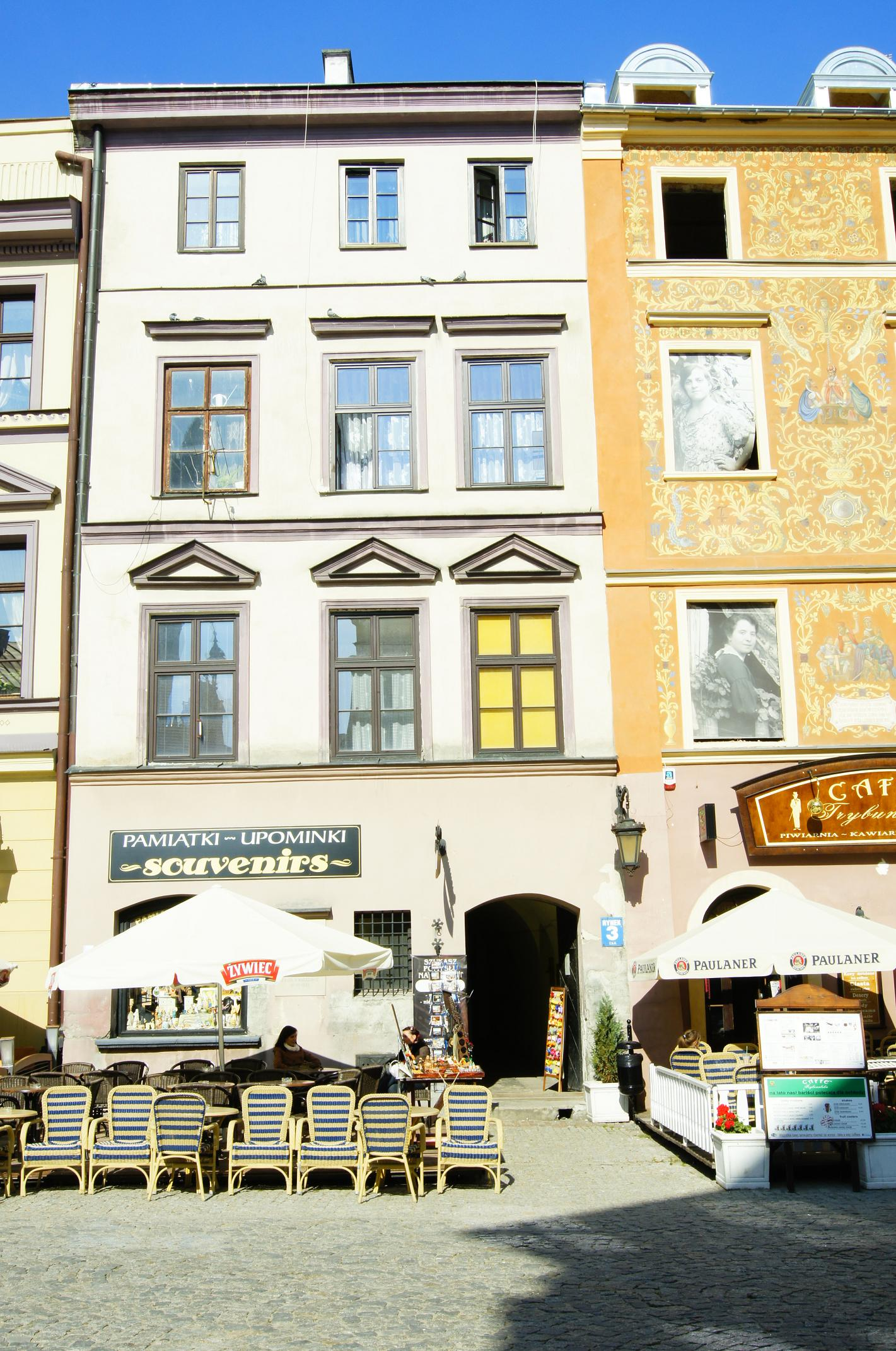 Lublin, Rynek 3 - kamienica (zabytek nr A/510 z 14.06.1971)